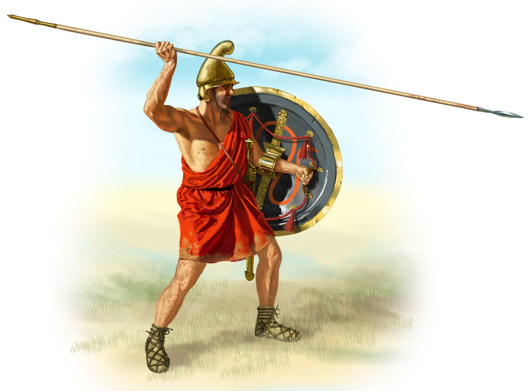 Hypaspist